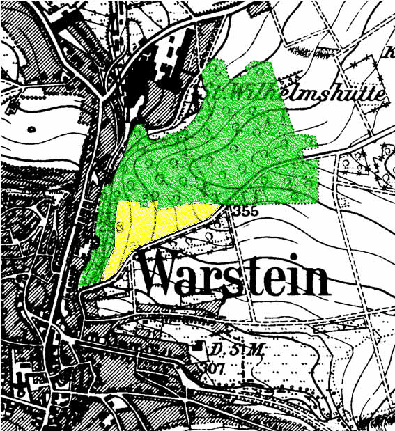 Lage des Naturschutzgebiets „Oberhagen“ (Wald, grün) und des angrenzenden Biotops „Magerwiese“ (gelb) in Warstein; Zustand um 1900, Umzeichnung einer historischen Karte Kartengrundlage: Topografische Karte 1:25.000 (Blatt 4516, Warstein, von 1900) Einzeichnung der farbigen Flächen: Stefan Enste, Frühjahr 2006